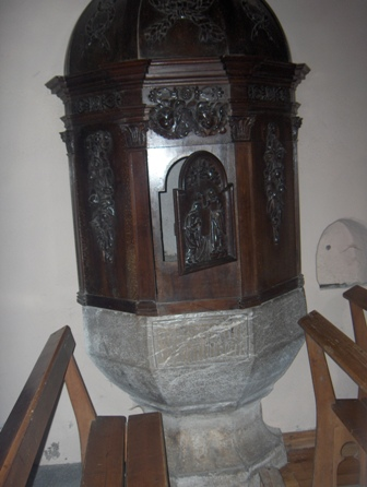 La cuve creusée dans un bloc de granit surmontée d'un meuble - 1503